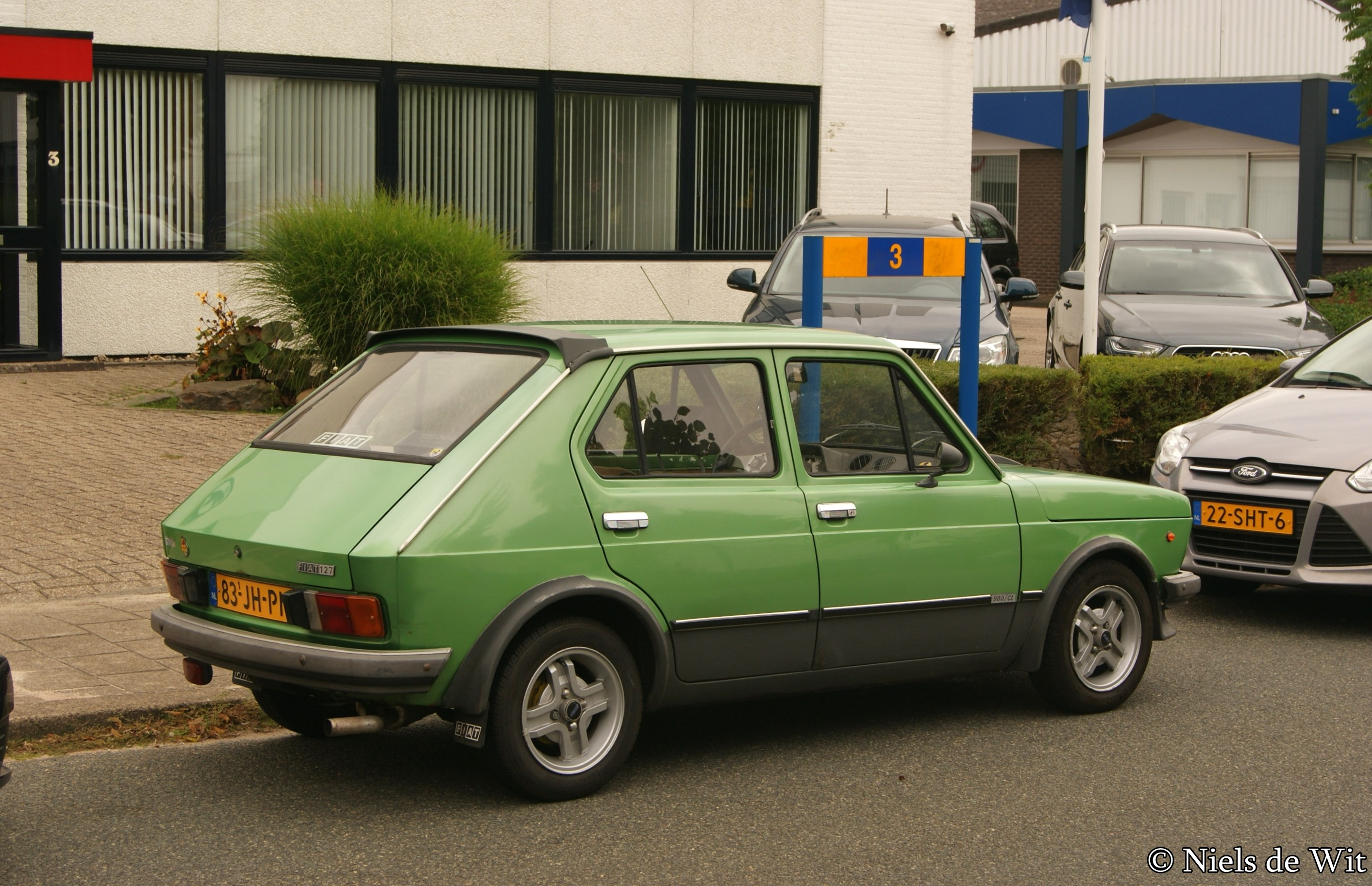 83-JH-PN